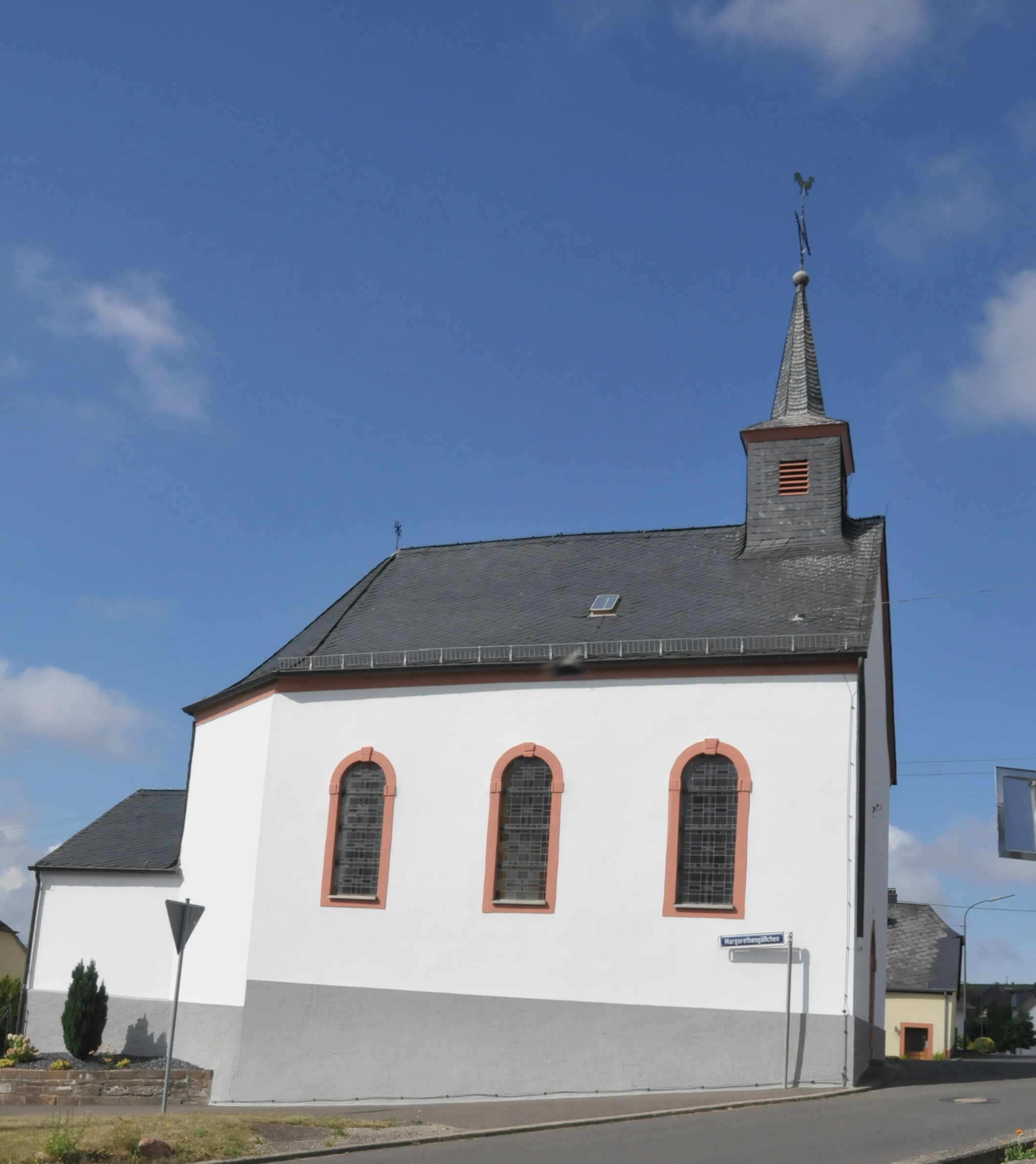 Bonerath, Kirche St. Arnulf und St. Margarethe